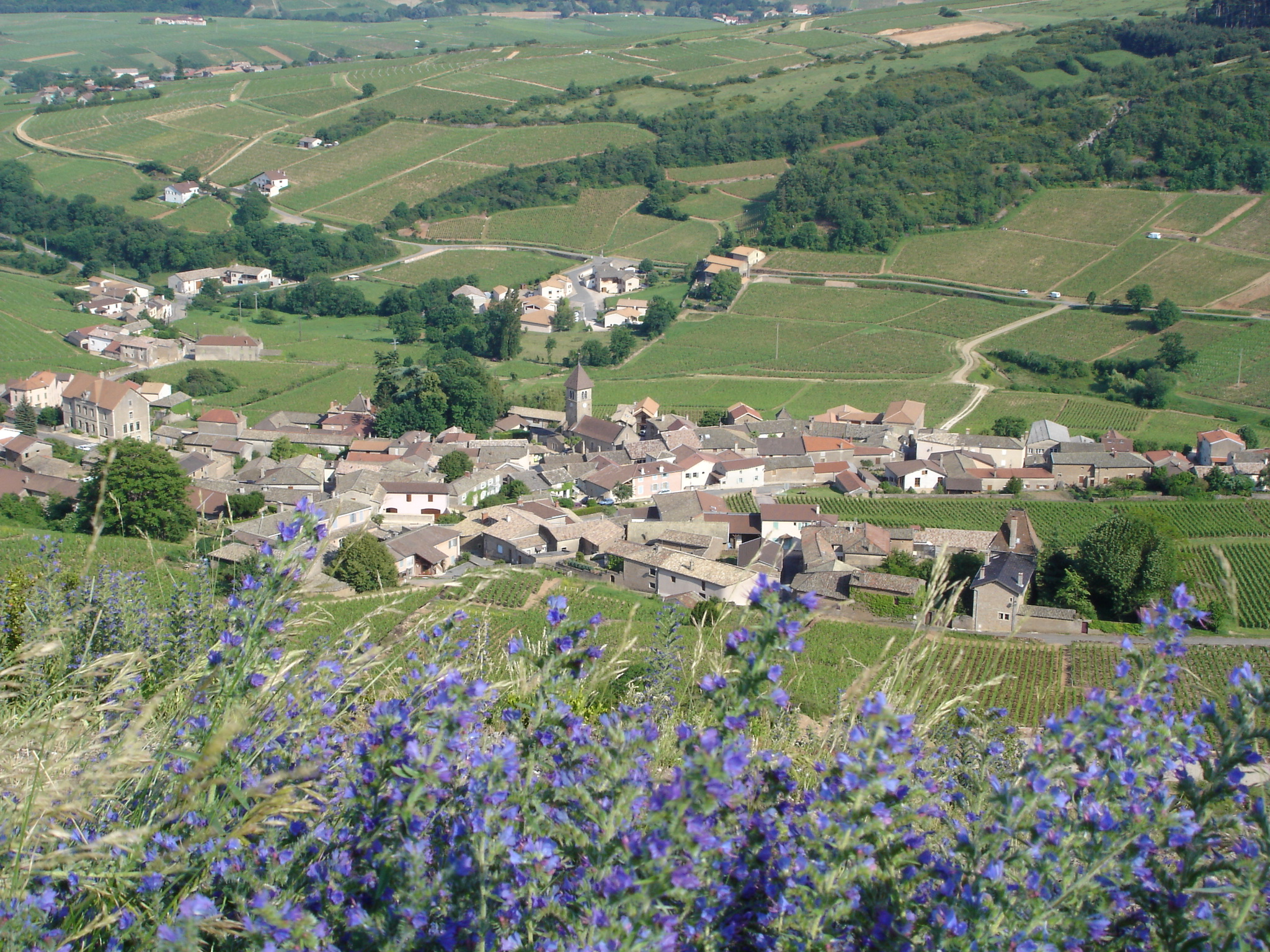 Le village de Solutré vu depuis la roche de Solutré -- Photo amateur prise par moi-même